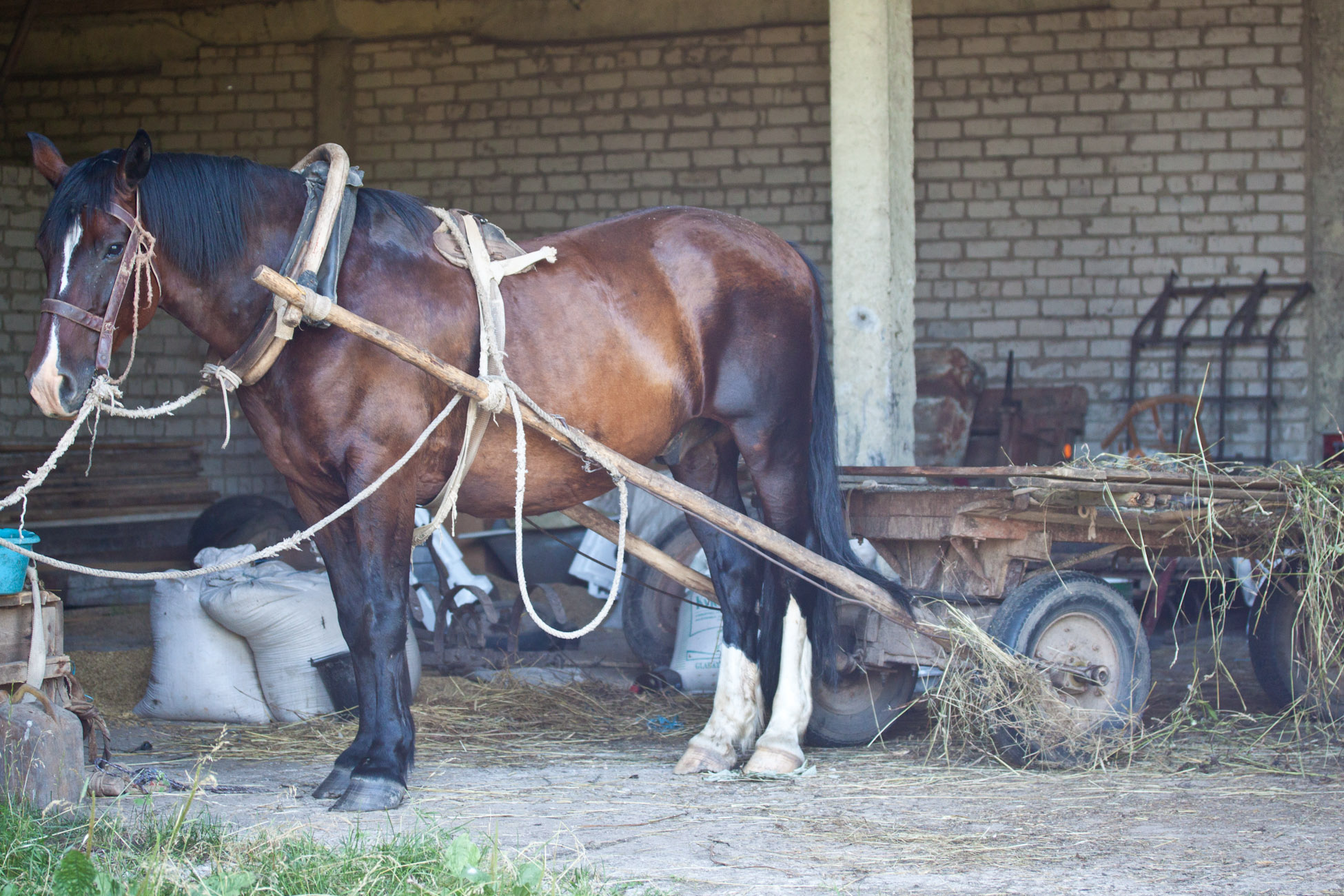 Lettland - Lazdukalni-1539